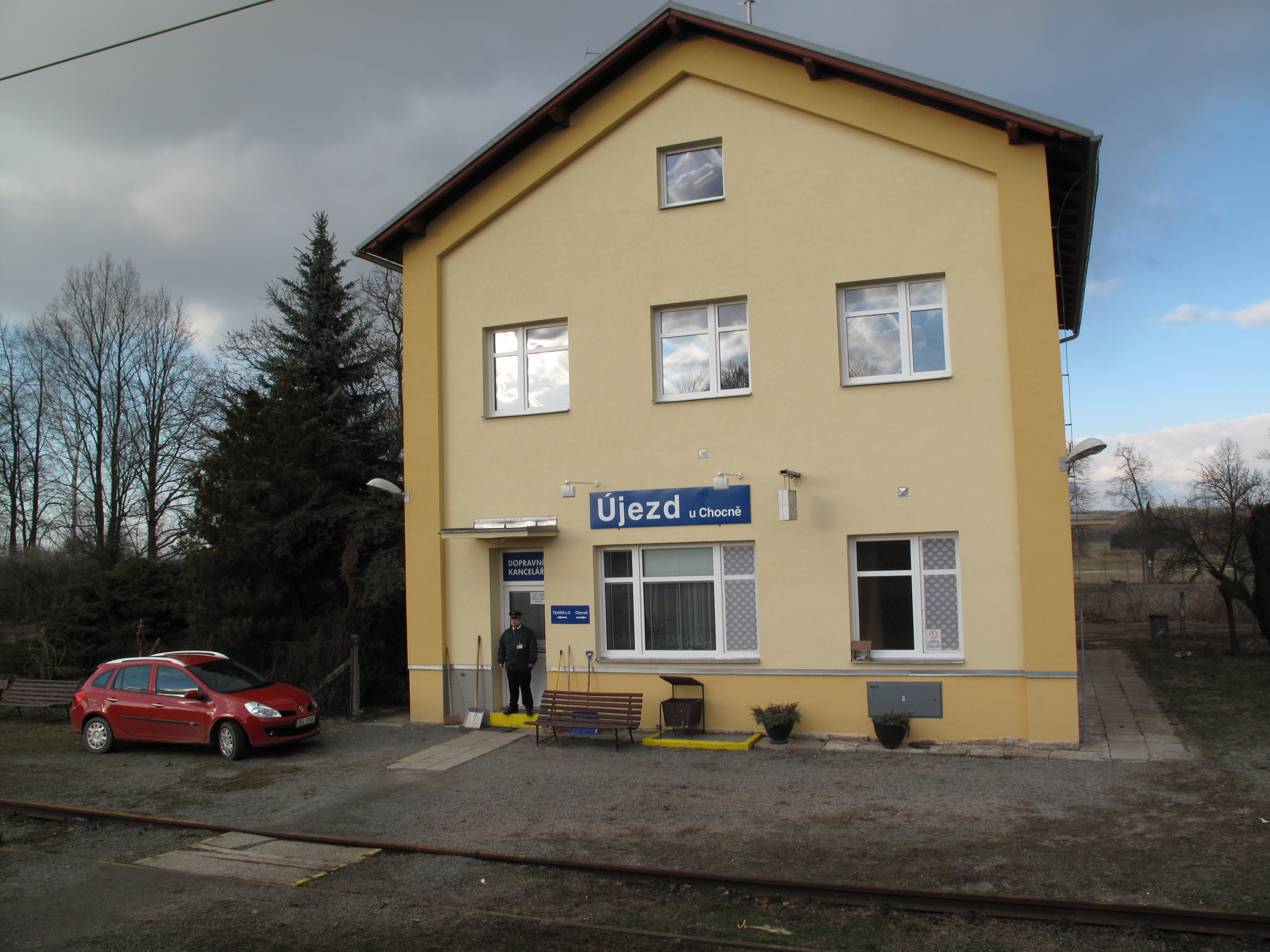 Újezd u Chocně, železniční stanice